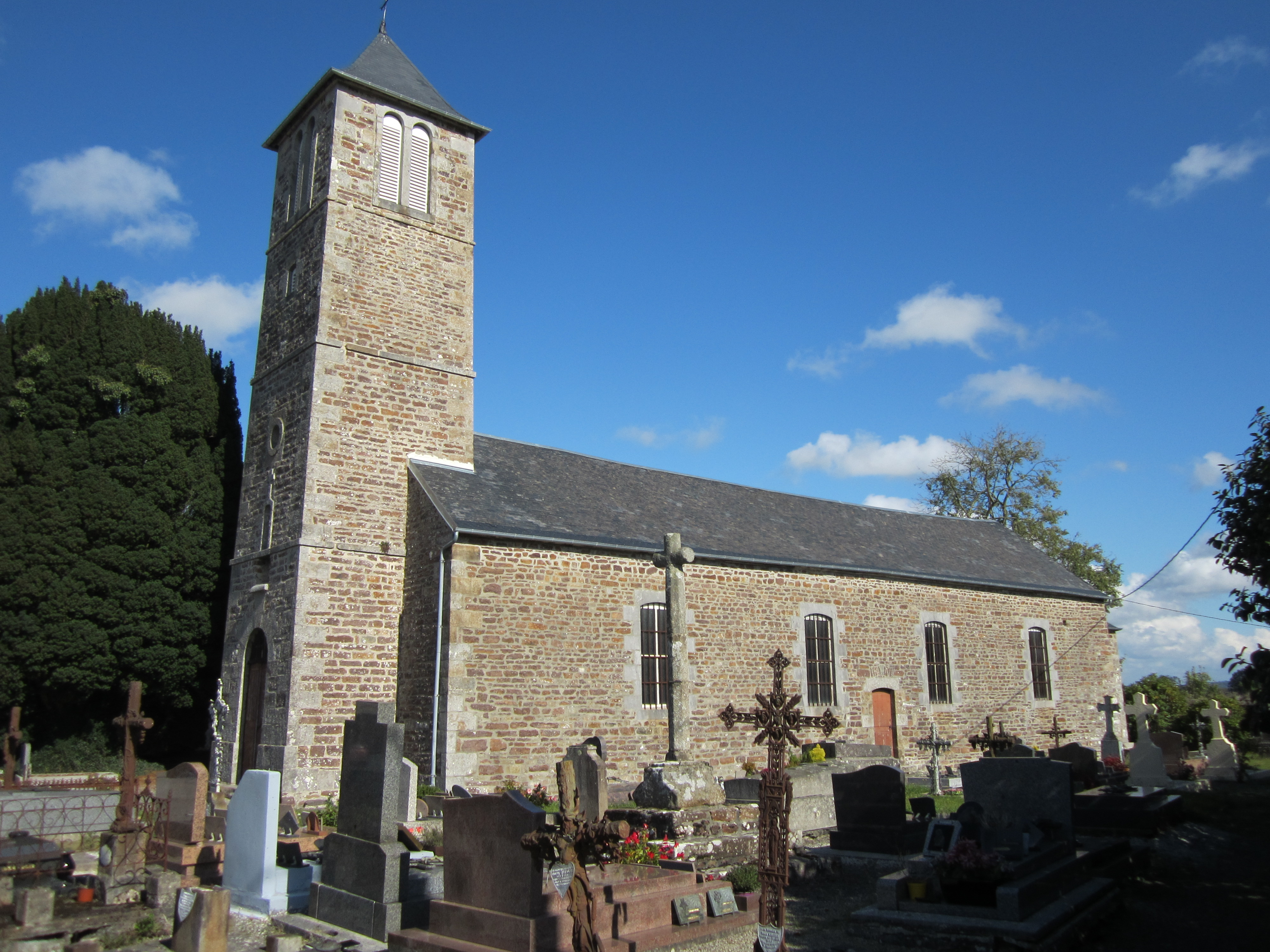 Bourey, absorbé par Cérences, Manche